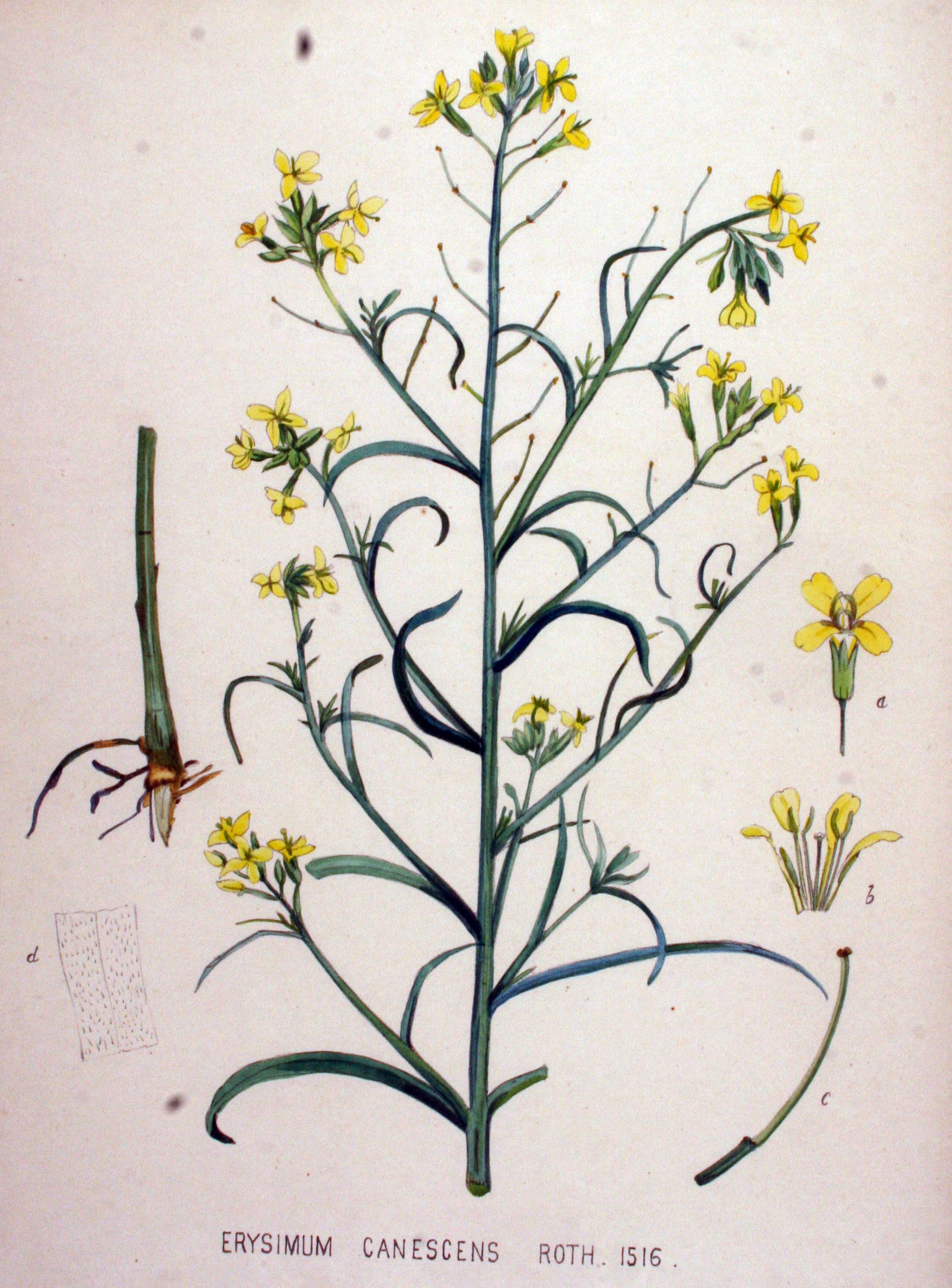 Erysimum diffusum Ehrh. (Syn. Erysimum canescens Roth.)